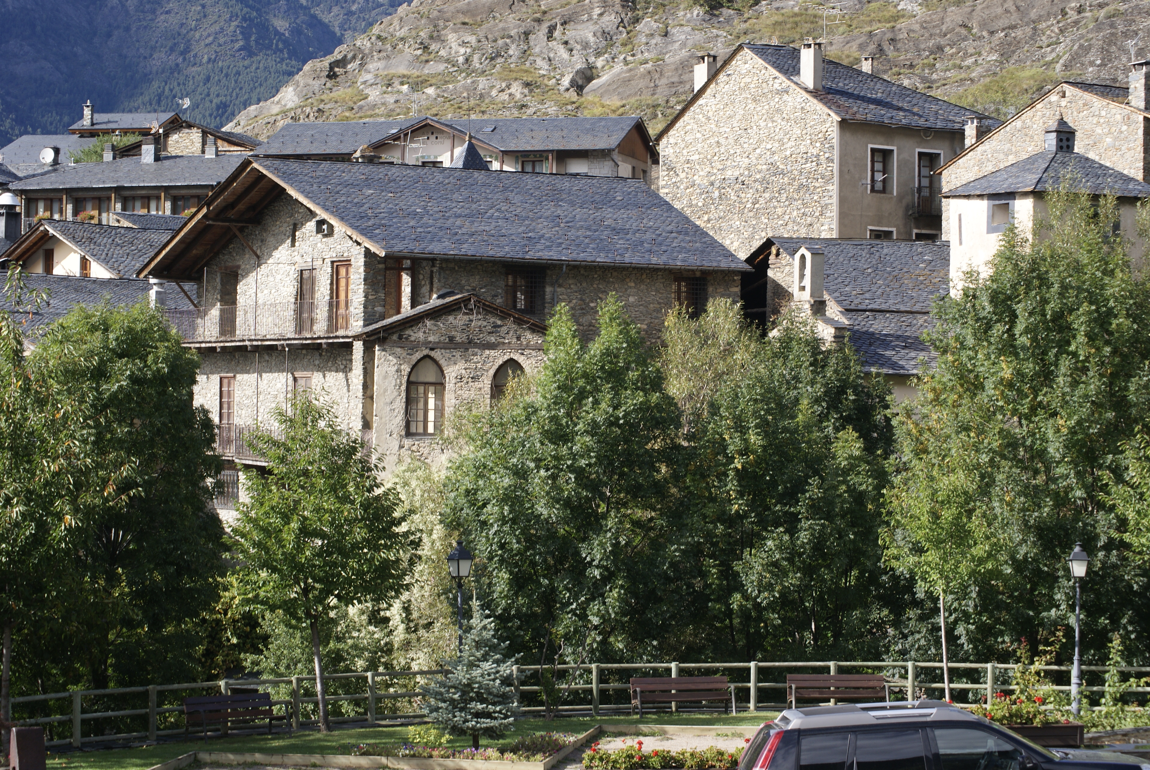 Casa Rossell, amb la capella (al centre darrere els arbres) i el colomer (dreta)